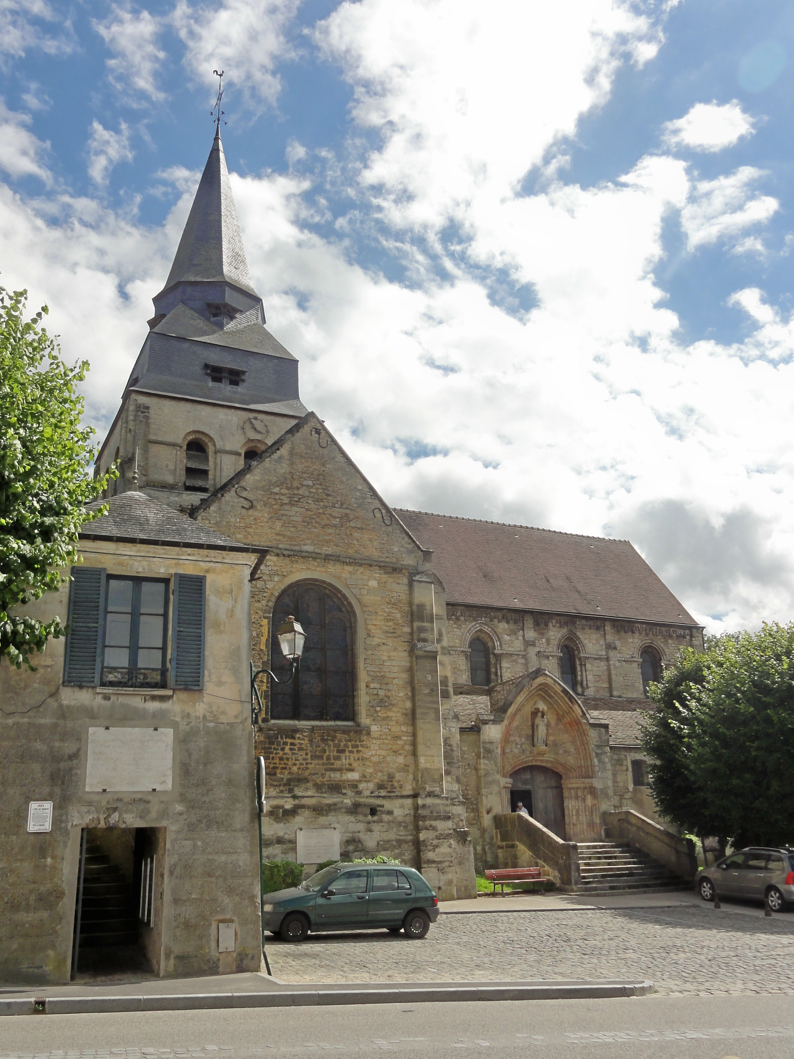 Vue depuis le nord.